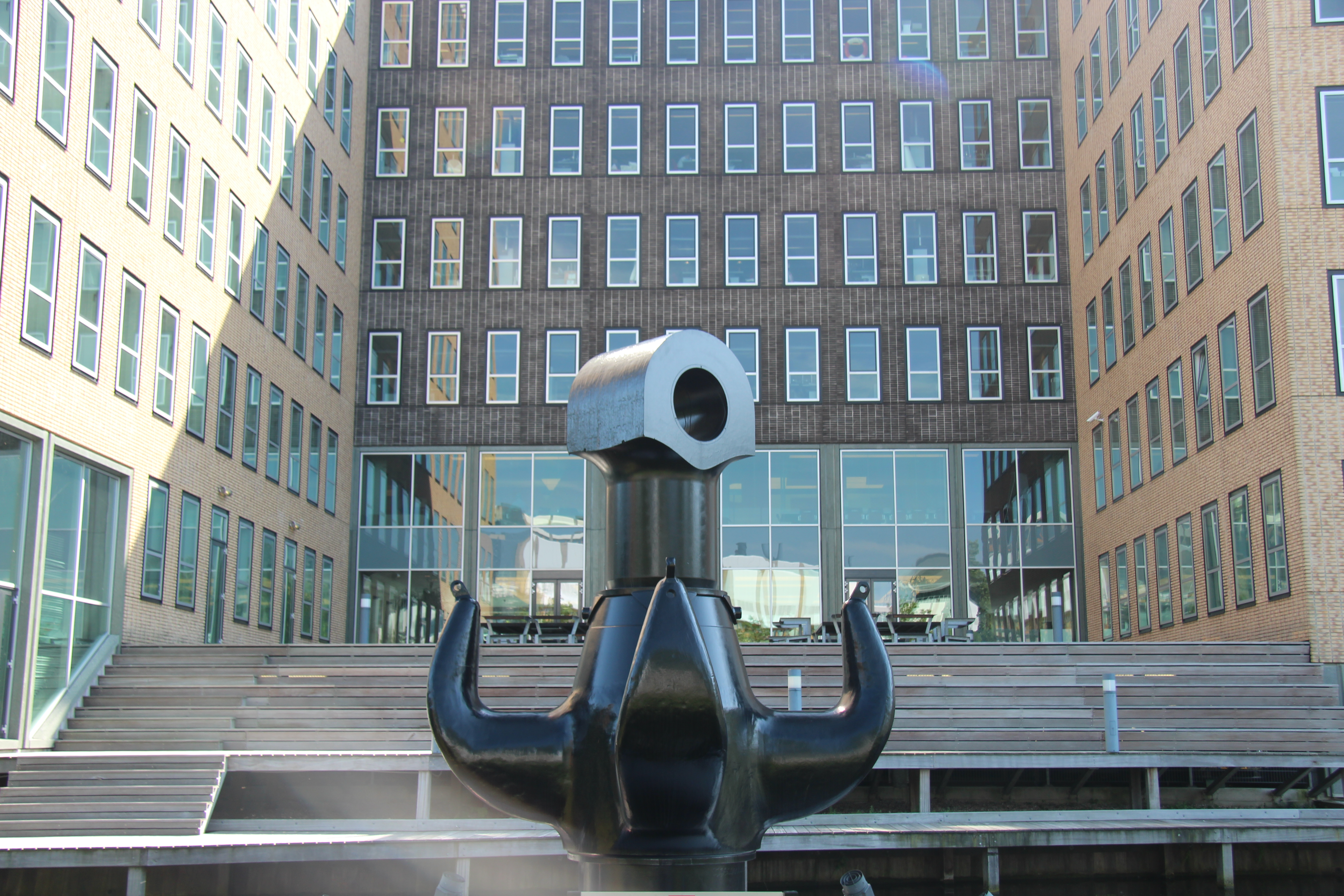 Kraanhaak van HLV Thialf voor gebouw Heerema Marine Contractors - Plesmanlaan Leiden - geplaatst bij opening gebouw in 2006.